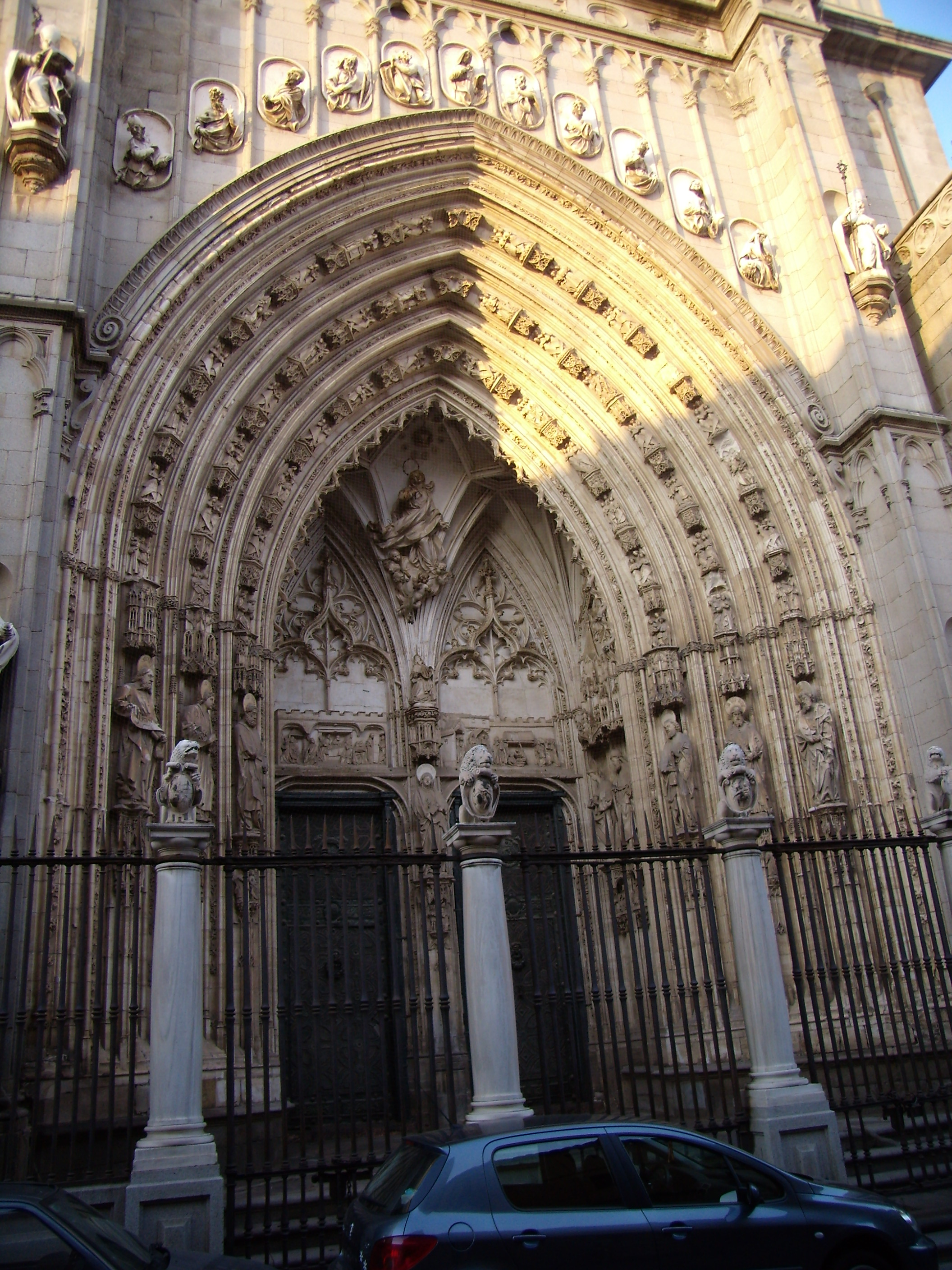 Puerta de los leones en la Catedral de Toledo